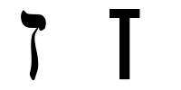 hebrew letter zayin